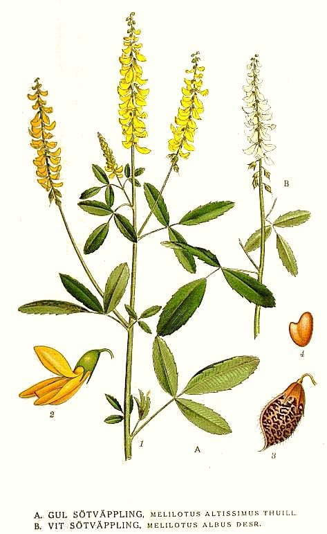 Melilotus altissimus Thuill., Melilotus albus Medik Original Description A. Gul sötväppling, Melilotus altissimus Thuill. B. Vit sötväppling, Melilotus albus Desr.